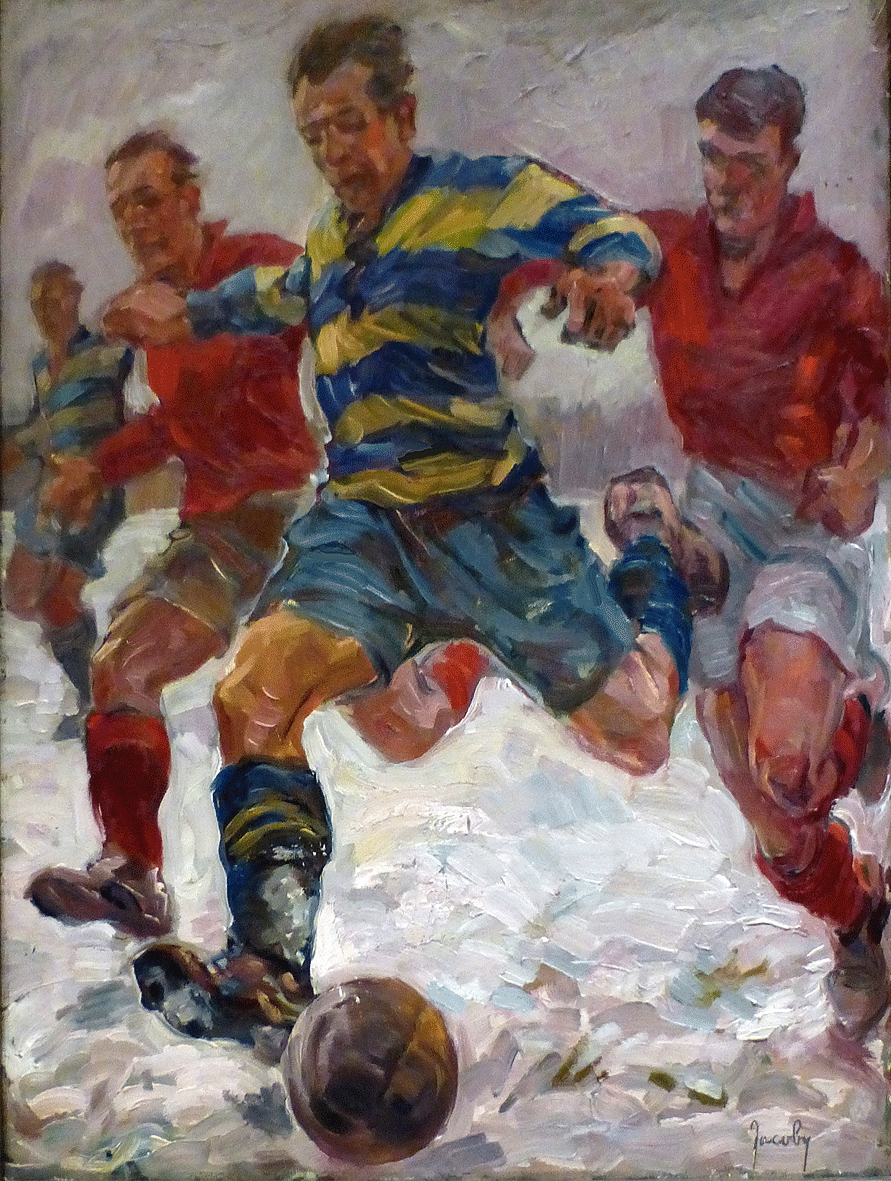 Jean Jacoby; Dëst Bild huet de Kënschtler 1932 bei den Olympeschen Spiller zu Los Anegeles presentéiert.Huile sur papier, 60x50 cm